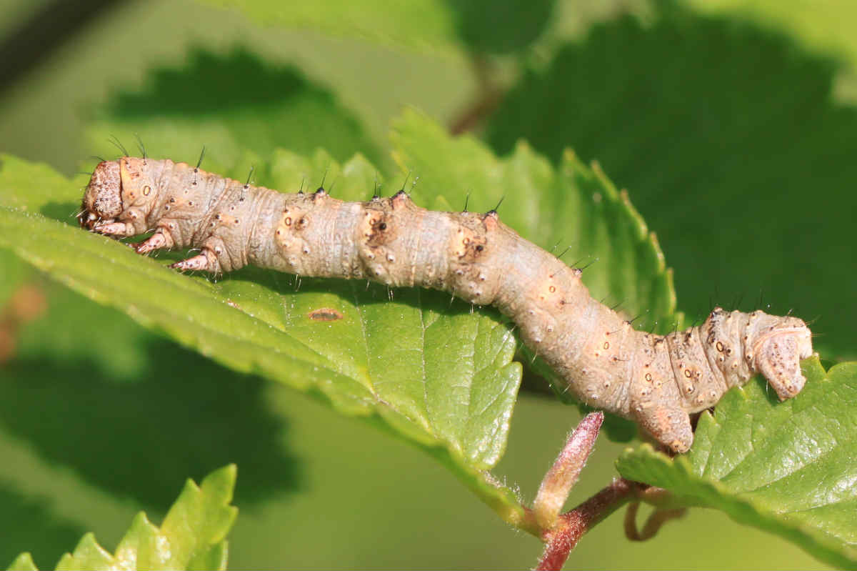 Älteres Raupenstadium des Schneespanners (Phigalia pilosaria) am 29.4.2017 in der Schwetzinger Hardt